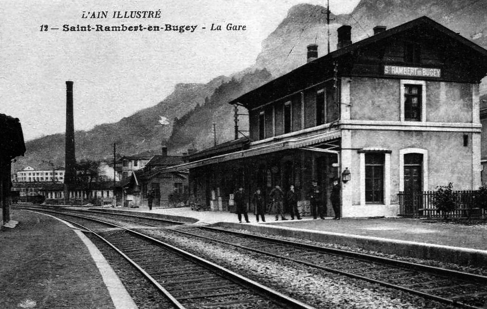 Carte postale ancienne, montrant l'intérieur de la gare de Saint-Rambert-en-Bugey et une usine en arrière plan.